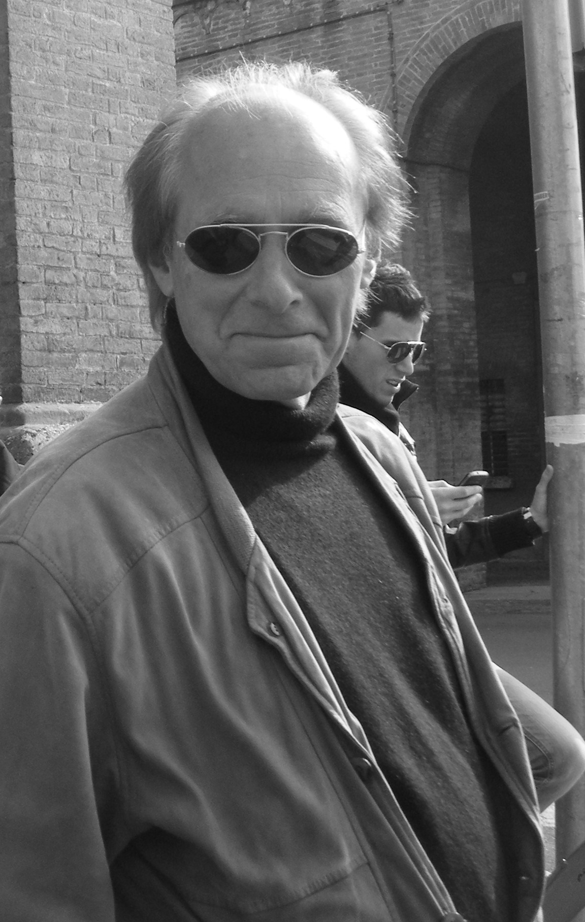 Michael Groblewski ist ein deutscher Kunsthistoriker und Hochschullehrer (*1950 in Dortmund) mit Schwerpunkt auf italienische Kunstgeschichte, Architektur und Architekturtheorie sowie moderne und zeitgenössische Kunst. Er lebt und arbeitet in Darmstadt (Hessen) und Alghero (Sardinien, Italien).